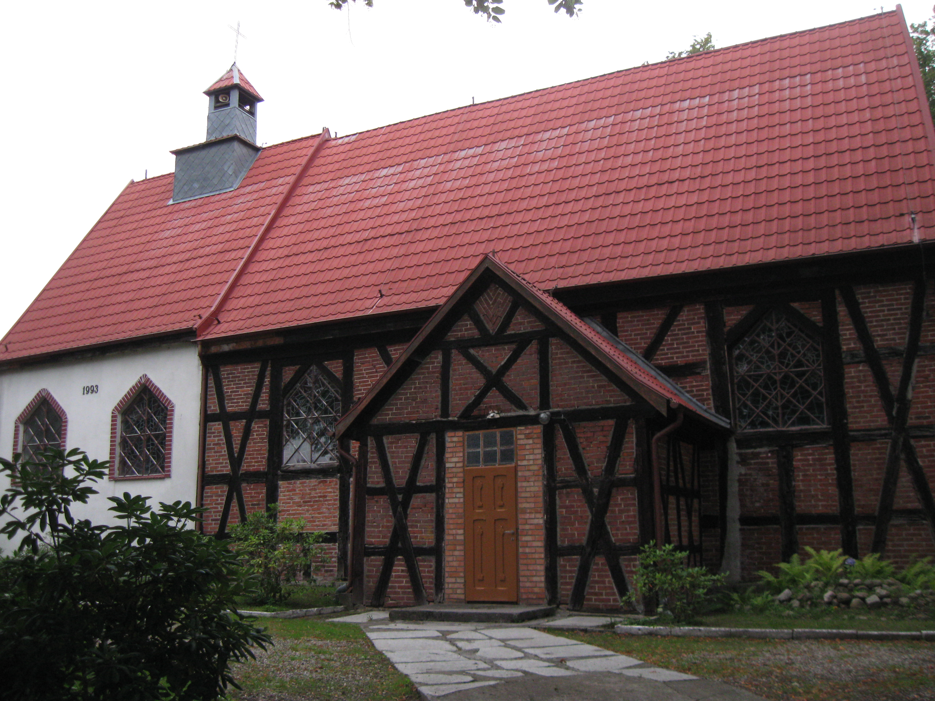 Kościół parafialny pw. Matki Boskiej Królowej Polski w Gorawinie (widok od południa)